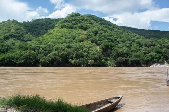 Puerto Nariño sobre el Río Magdalena